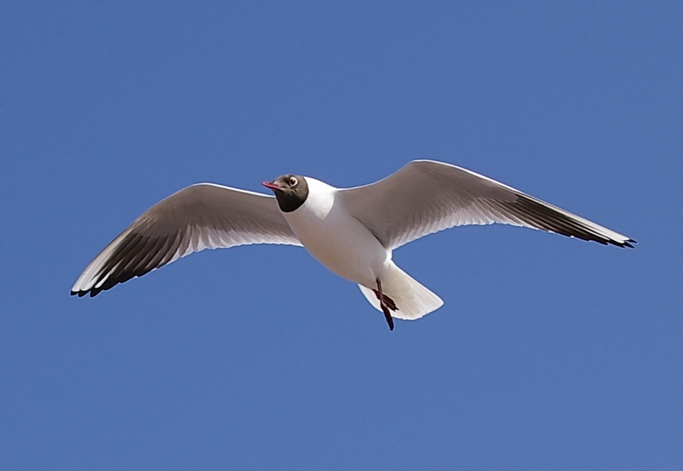 Lachmöwe im Flug, von unten fotografiert